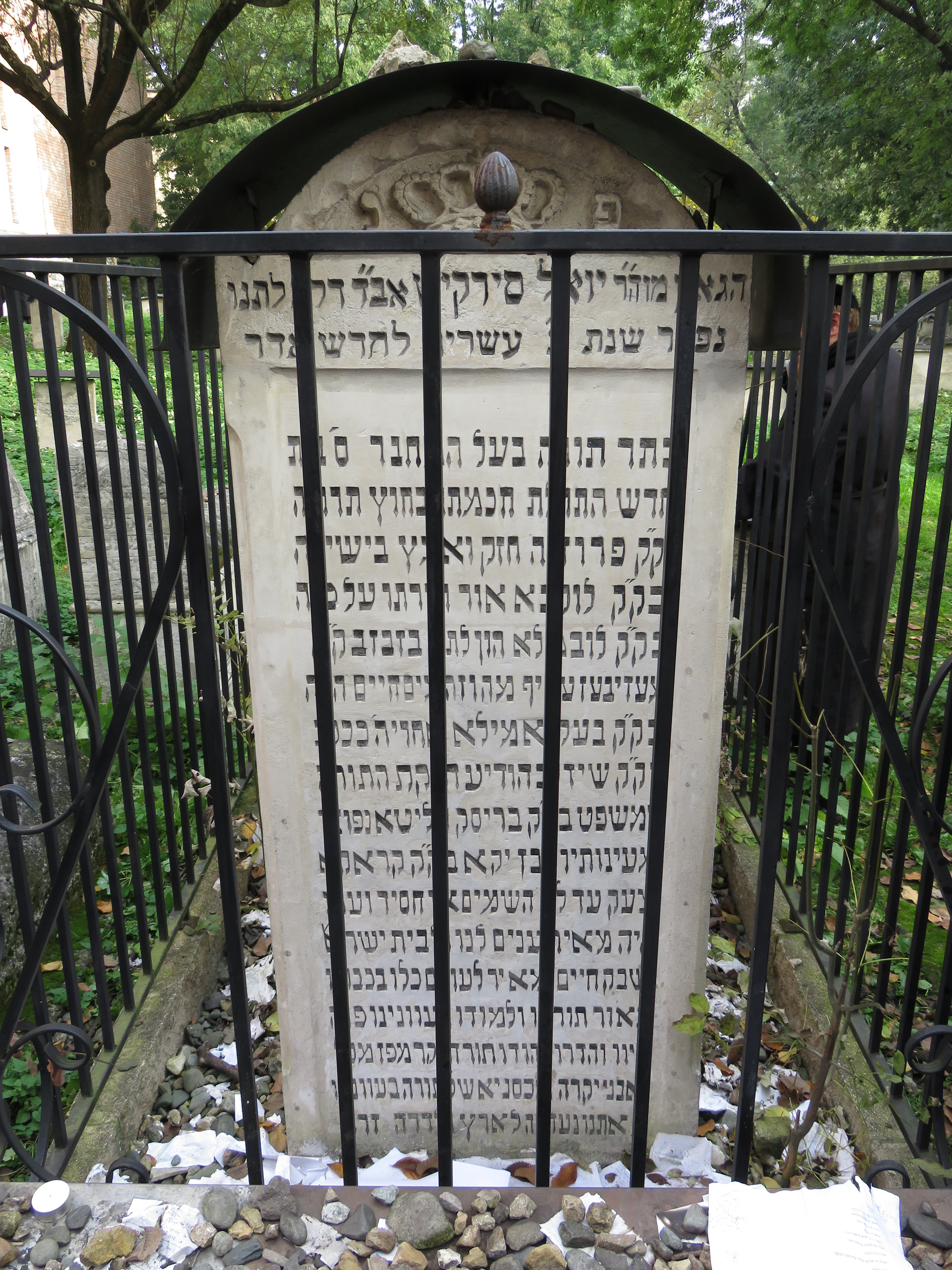 מצבת קברו של רבי יואל סירקיש ("הב"ח"), בית הקברות היהודי העתיק בקזימייז', קרקוב (1).jpg